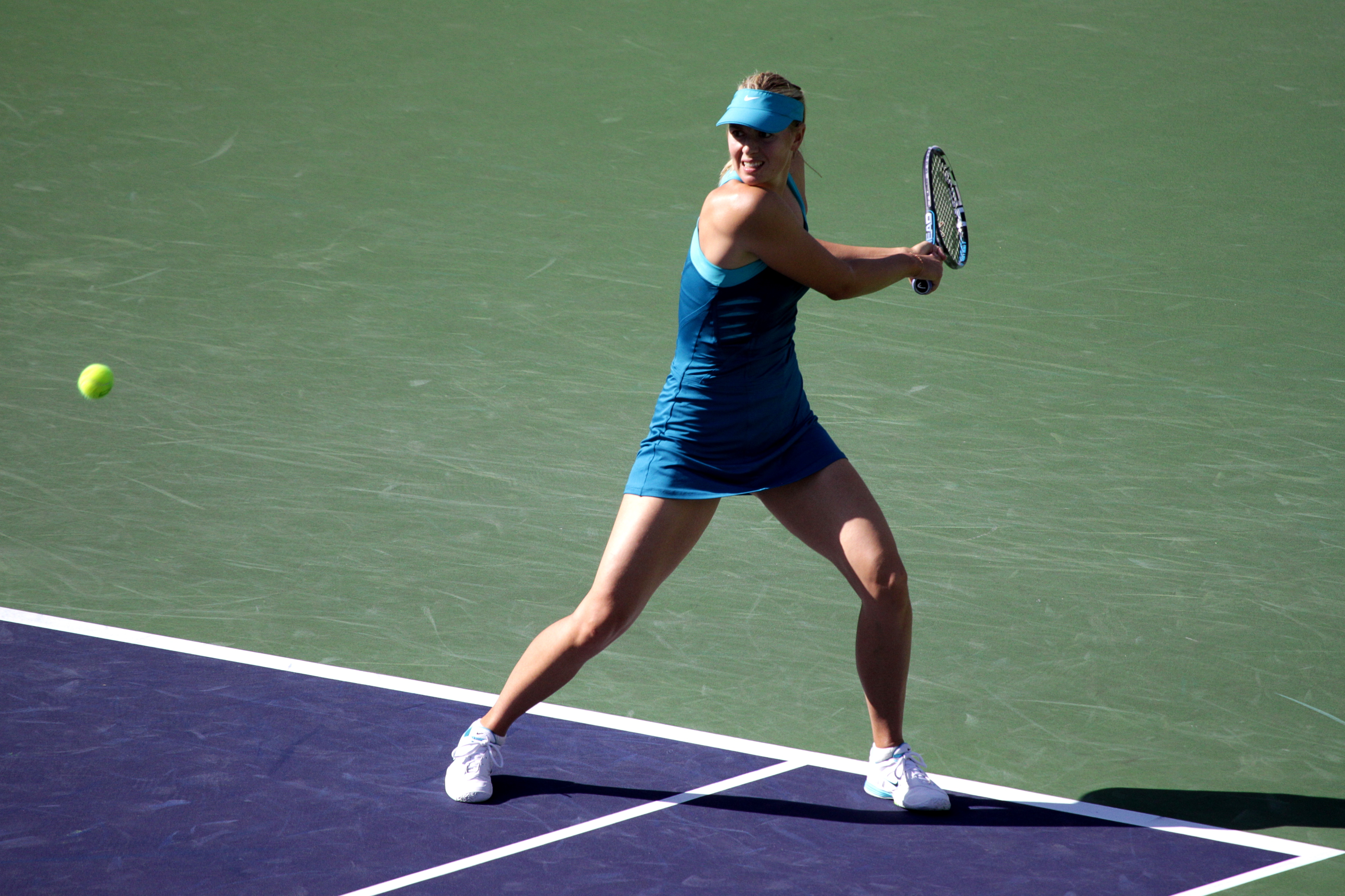 Maria Sharapova day match